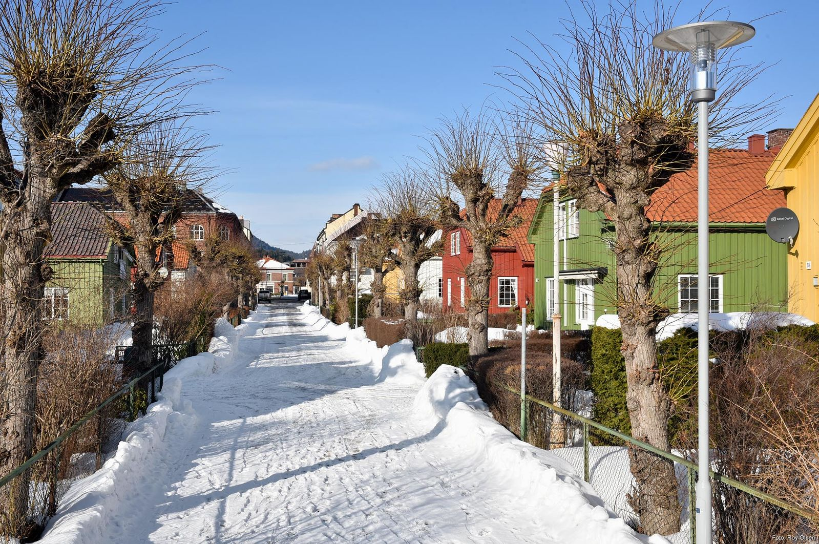 Bjørnstjerne Bjørnsons gate i «Grønnbyen», Notodden. Boligområdet ble bebygget som arbeiderboliger for Norsk Hydros arbeidere i perioden 1906–1911